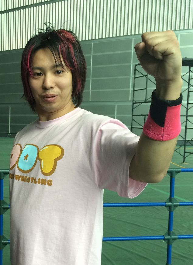 SSA大会にて